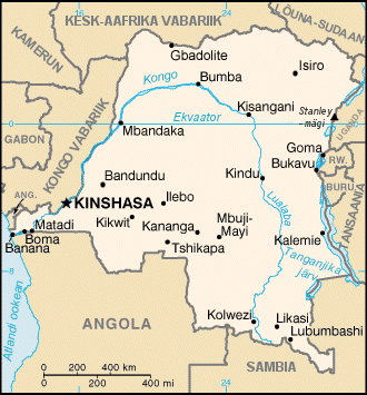 Kongo DV kaart